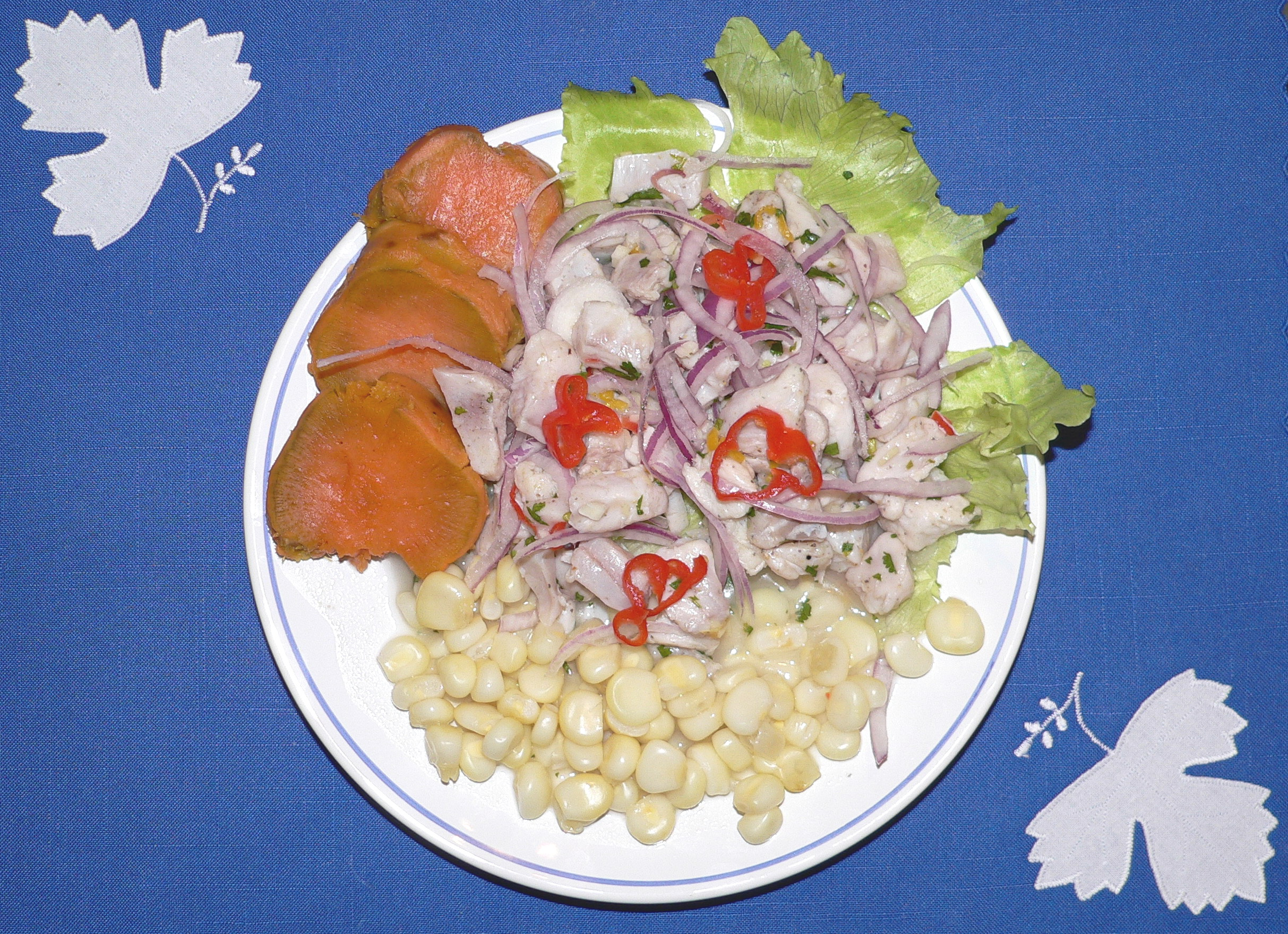 Descripción: Gastronomía del Perú Nombre: Ceviche del Perú País : Perú Fotógrafo: © Manuel González Olaechea y Franco Fecha : 18 de Noviembre de 2007